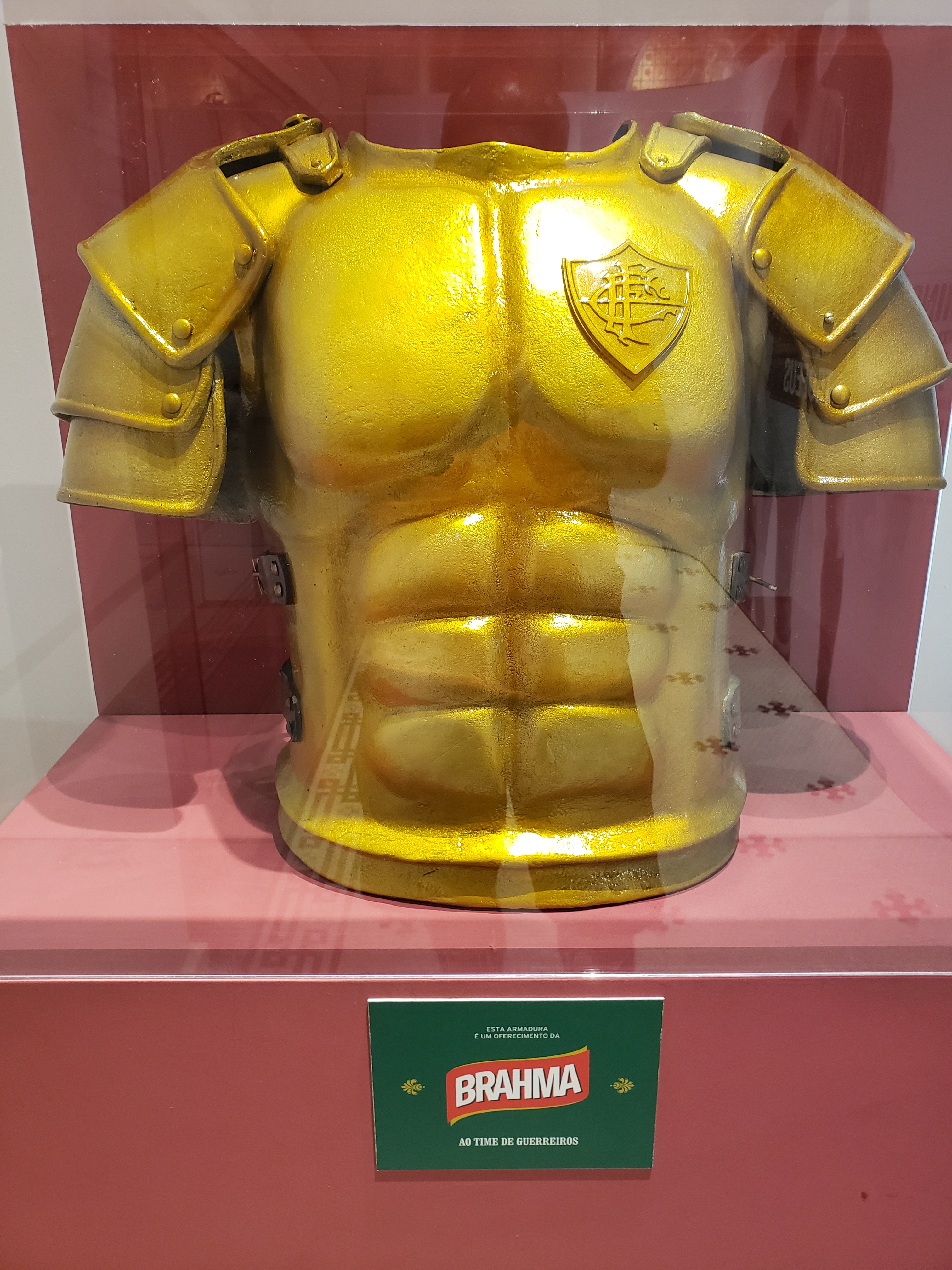 Homenagem da Cervejaria Brahma ao Fluminense Football Club, também conhecido como Time de Guerreiros, exposta na Sala de Troféus do Fluminense.